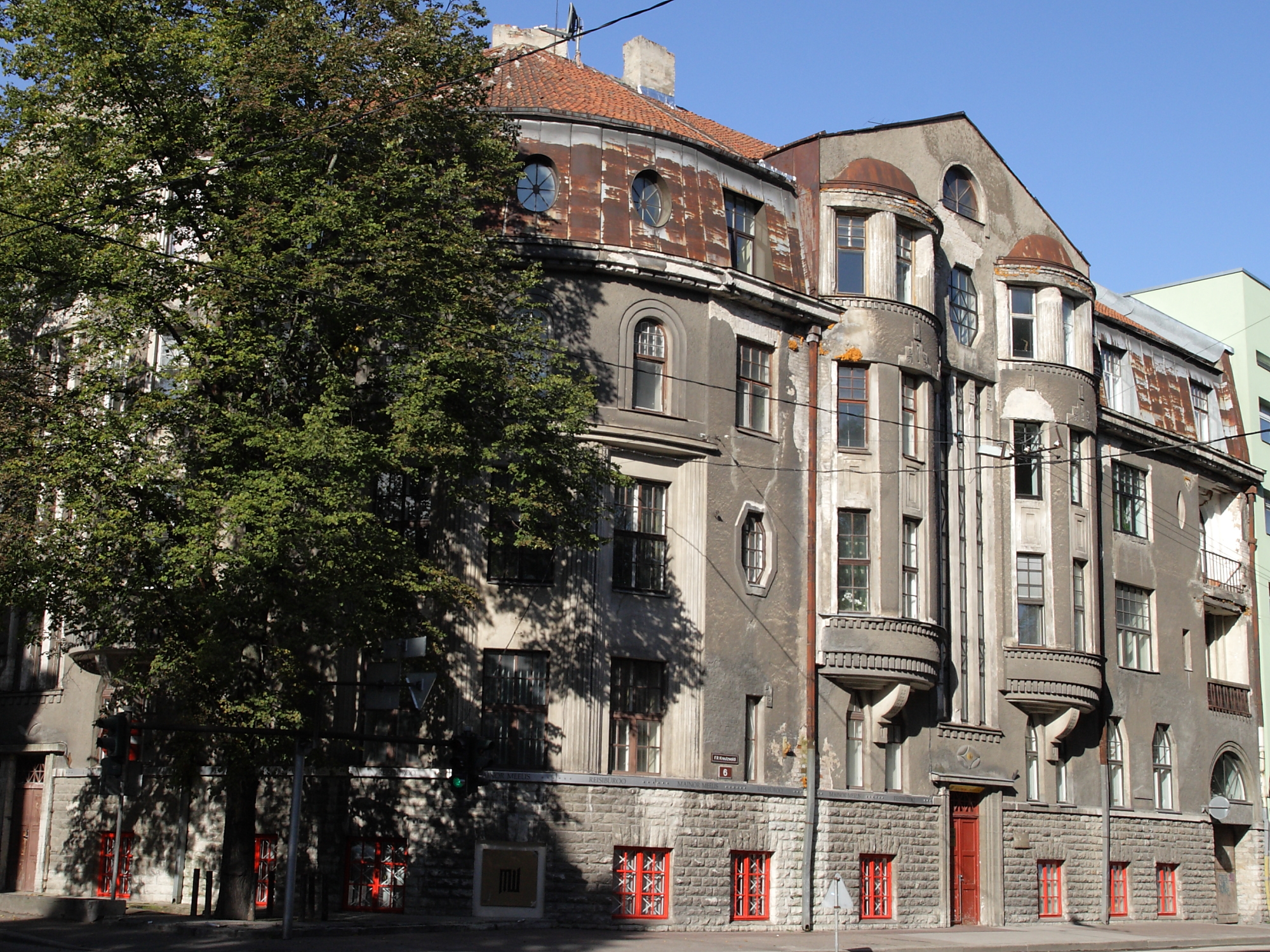 Tallinn, elamu Raua 39, 1912-1913